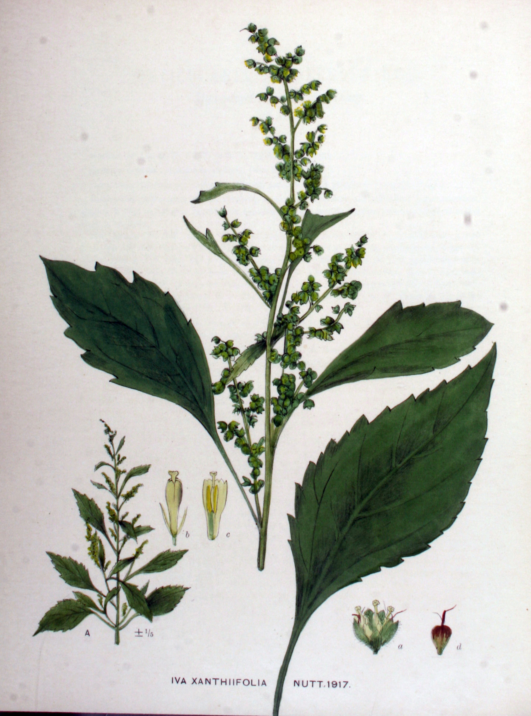 Legende: Oberer Teil der Pflanze. Blatt. A Oberer Teil der Pflanze (x0,2). a Körbchen. b Röhrenblüte. c Röhrenblüte, geöffnet. d Frucht.